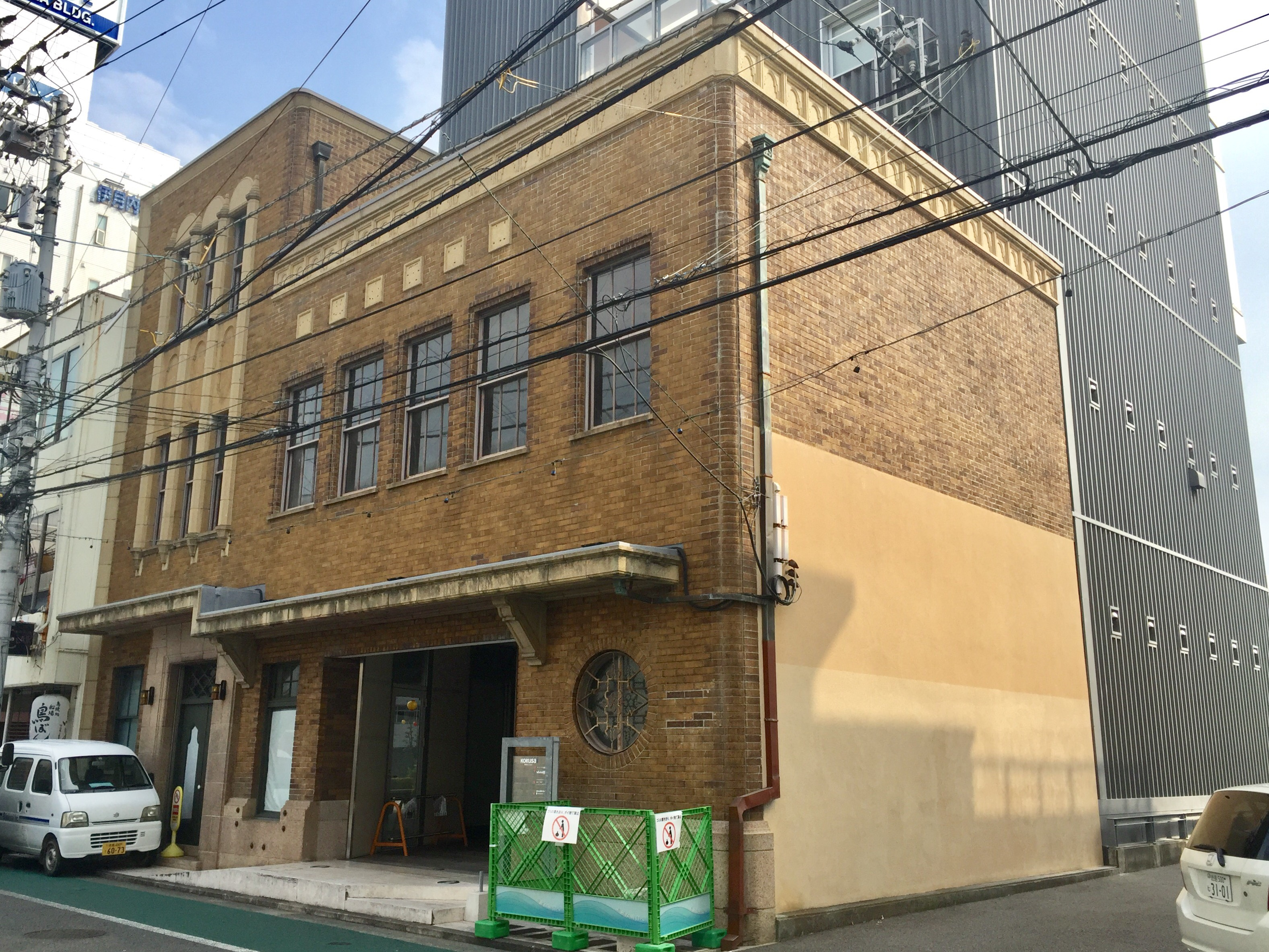 東船場通りに面する国際東船場113ビルの旧館「旧高原ビル」。